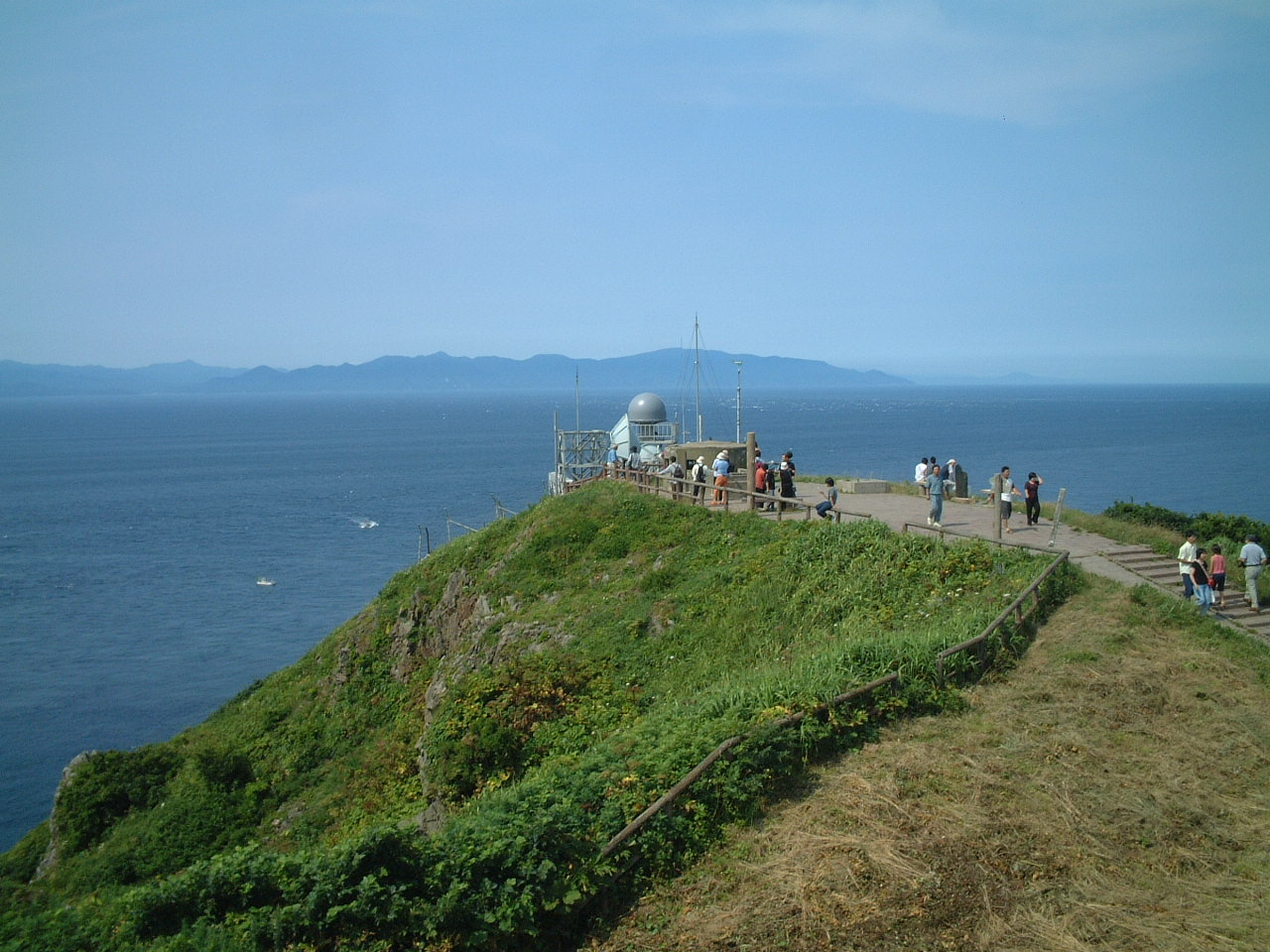 投稿者本人が撮影